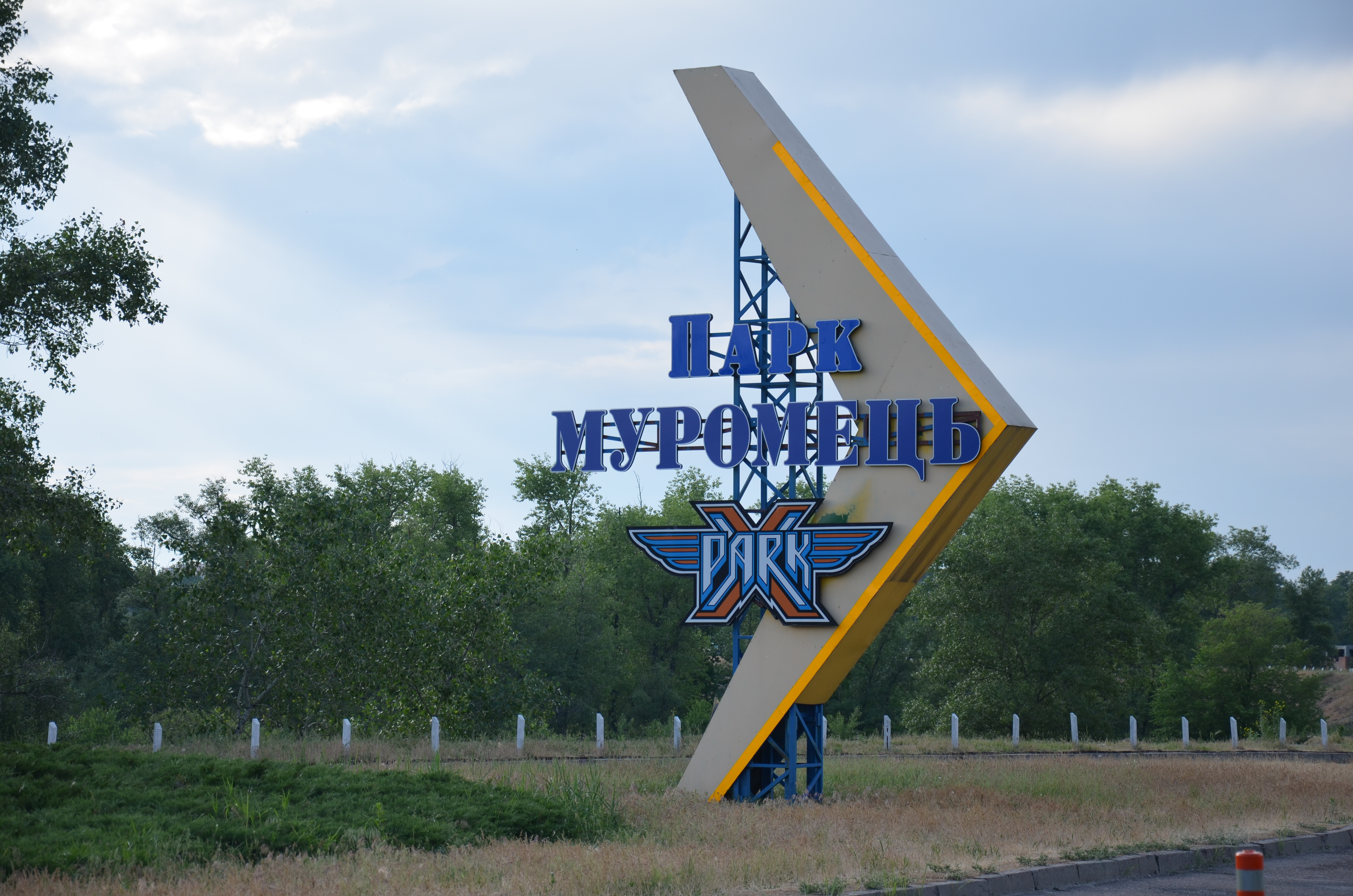 Муромець-Лопуховате, Деснянський район